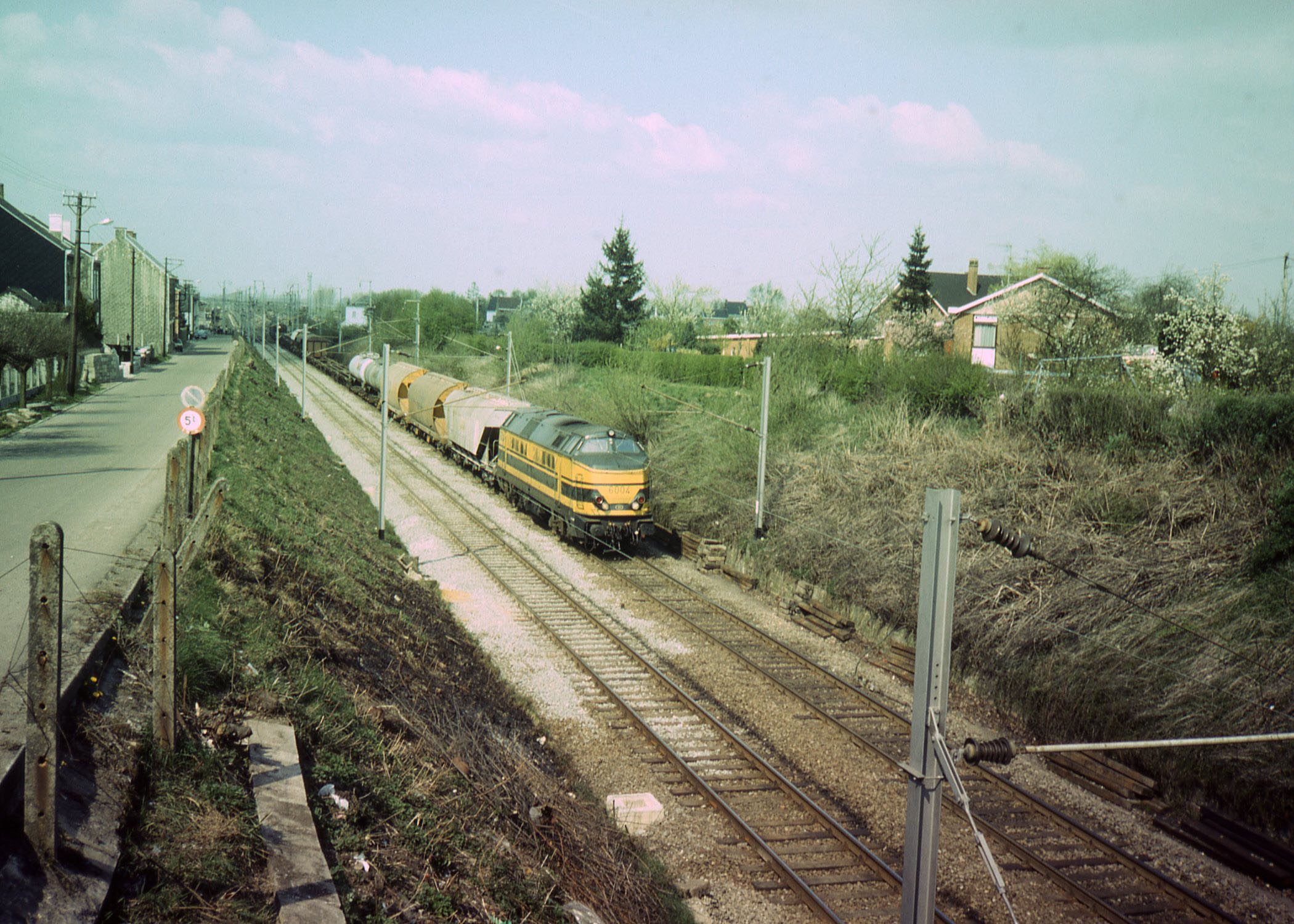 Een goederentrein die naar Frankrijk rijdt gezien vanaf de brug rue de l´Industrie in Quévy. In de verte het grensstation van Quévy. Links de toen nog typische bovengrondse elektriciteitsvoorziening.